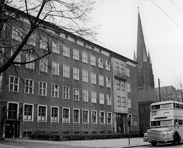 Berlin-Lichtenberg, Akademie für ärztliche Fortbildung ADN-ZB Franke Bre-Schr. 2.11.1964 Die Deutsche Akademie für Ärztliche Fortbildung In Berlin-Lichtenberg, die 1961 aus der Akademie für Sozialhygiene, Arbeitshygiene und ärztliche Fortbildung entstand, hat sich die Aufgabe gestellt, die Weiter- und Fortbildung der Ärzte zu leiten und durchzuführen. Etwa 23.000 Ärzte aus allen Fachrichtungen, Zahnärzte und Apotheker sind Hörer der 60 Lehrgänge, die jährlich stattfinden und von 500 bis 600 Dozenten geleitet werden. Es besteht die Möglichkeit der internatsmäßigen Unterbringung. Hier das Gebäude der Akademie für Ärztliche Fortbildung, wo auch das Deutsche Zantralinstitut für Arbeitsmedizin und die Institute für Sozialhygiene, für Planung und Organisation des Gesundheitsschutzes sowie des Institut für die Technologie der Gesundheitsbauten untergebracht sind.